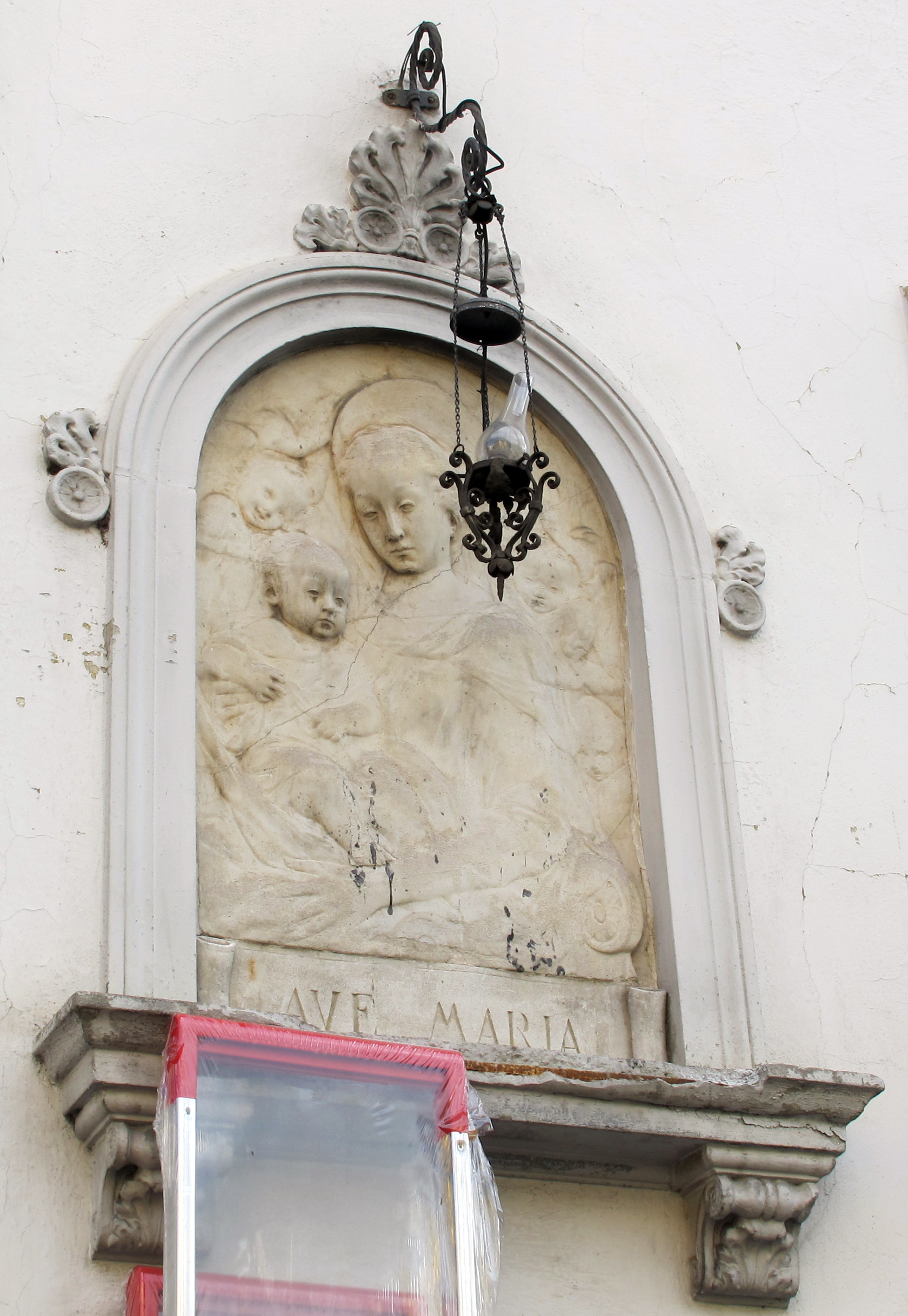 Piazzale Donatello, Firenze